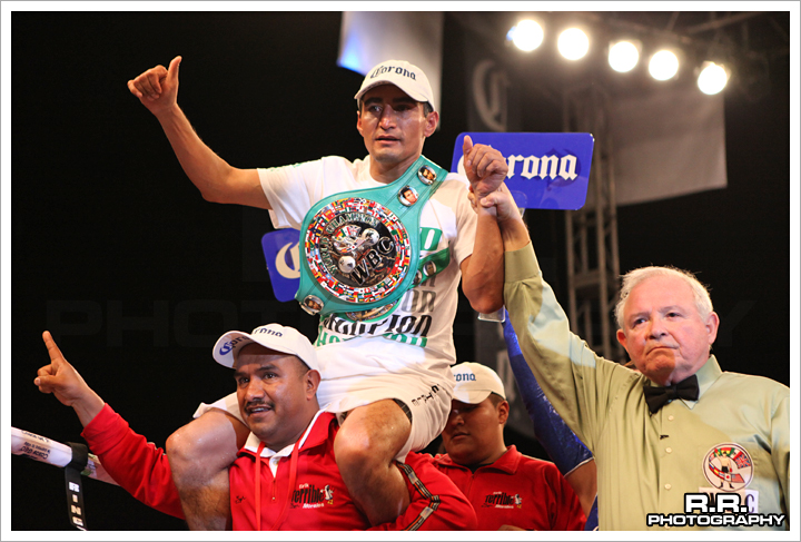 Evento Box, Erik Terrible Morales vs Francisco Lorenzo. Sabado, 18 de Diciembre del 2010 en el Estadio Caliente en Tijuana, Mexico. Boxing event, Erik Terrible Morales vs Francisco Lorenzo. Saturday, December 18th of 2010 at Caliente Stadium, in Tijuana, Mexico.